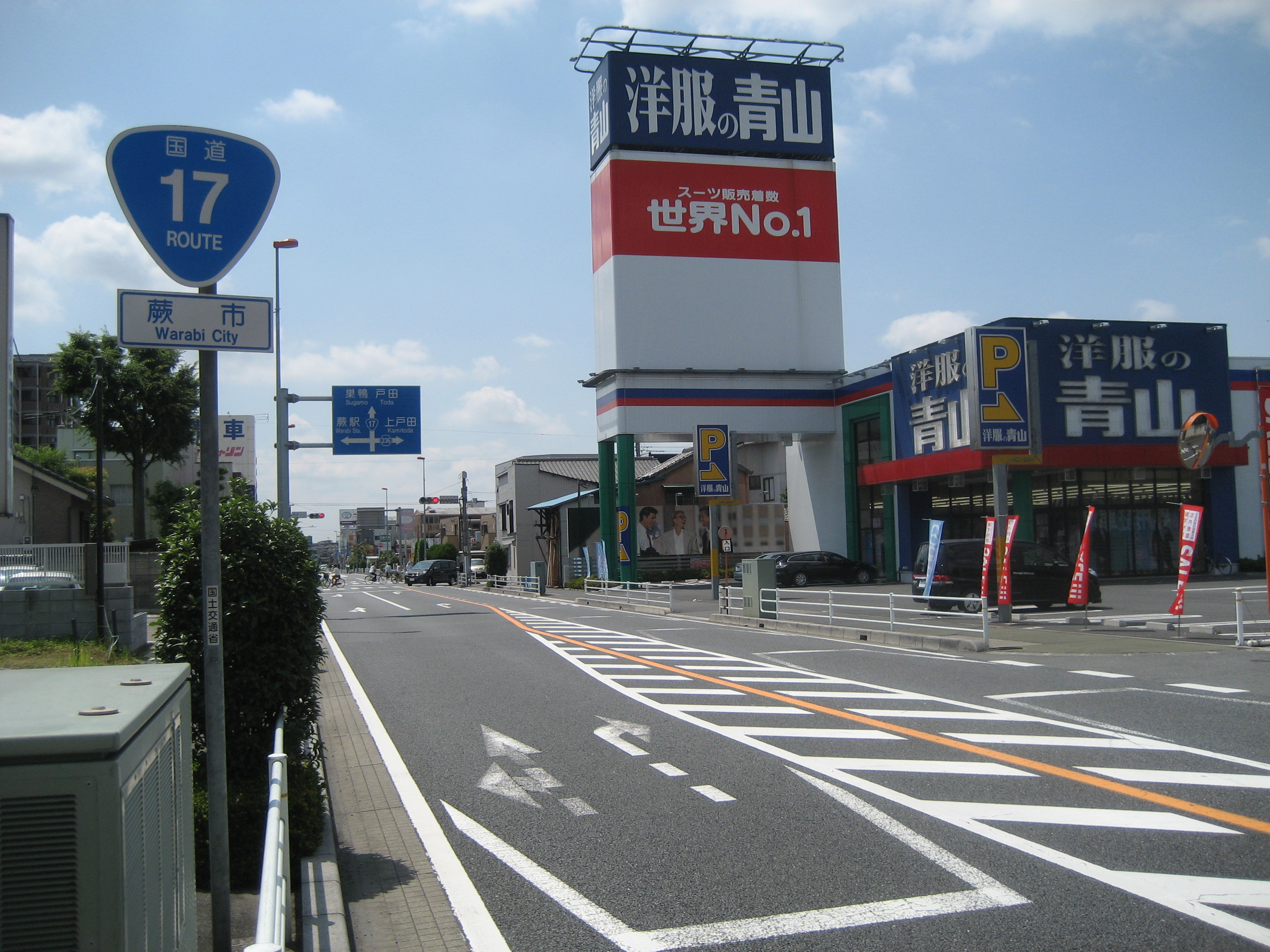 国道17号線埼玉県蕨市中央付近